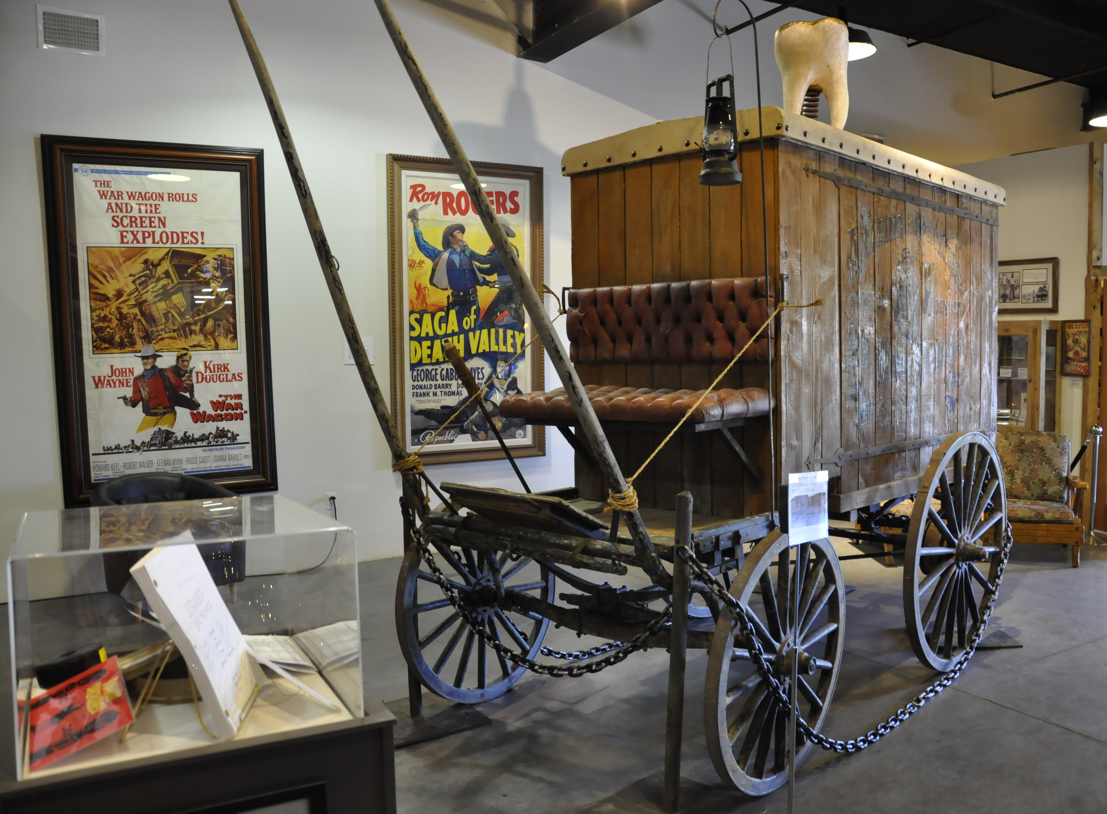 Coach uit de film Django Unchained van Quentin Tarantino in het Lone Pine Film History Museum te Lone Pine, CA, USA